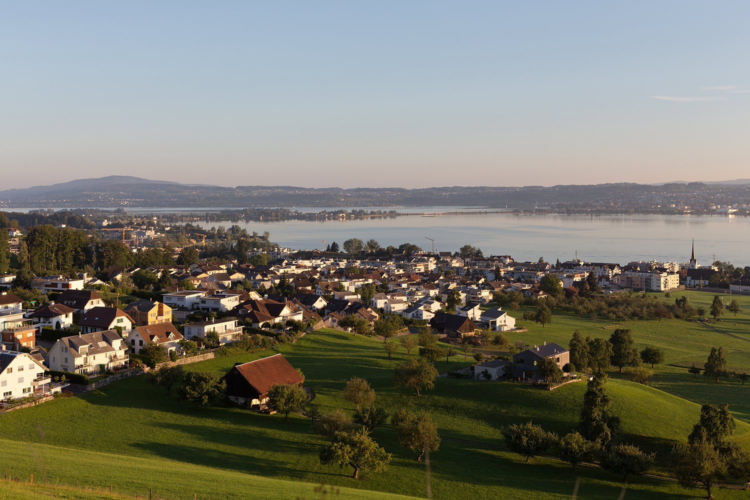 Altendorf (SZ) am Obersee (Zürichsee) mit Blick auf den Seedamm